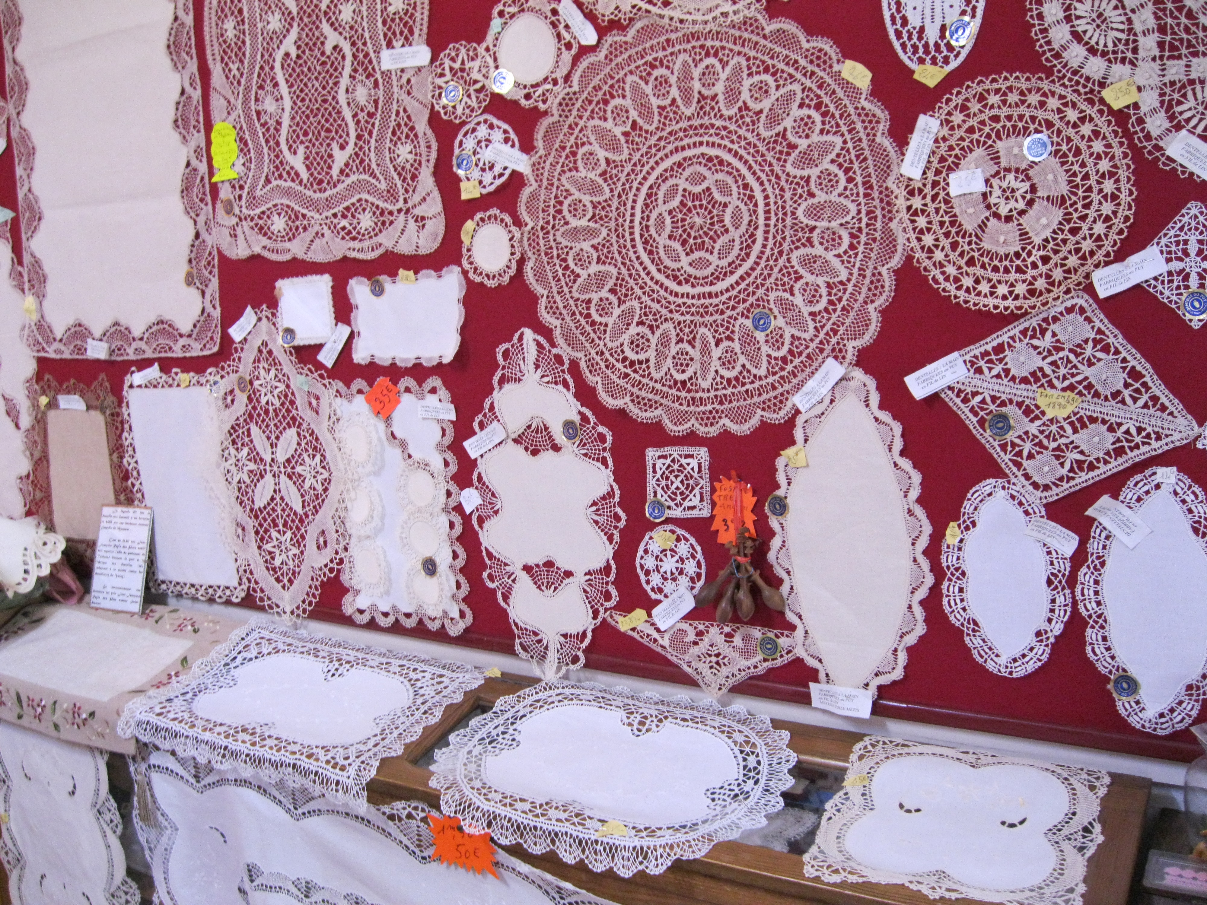 Dentelles du Puy en vitrine